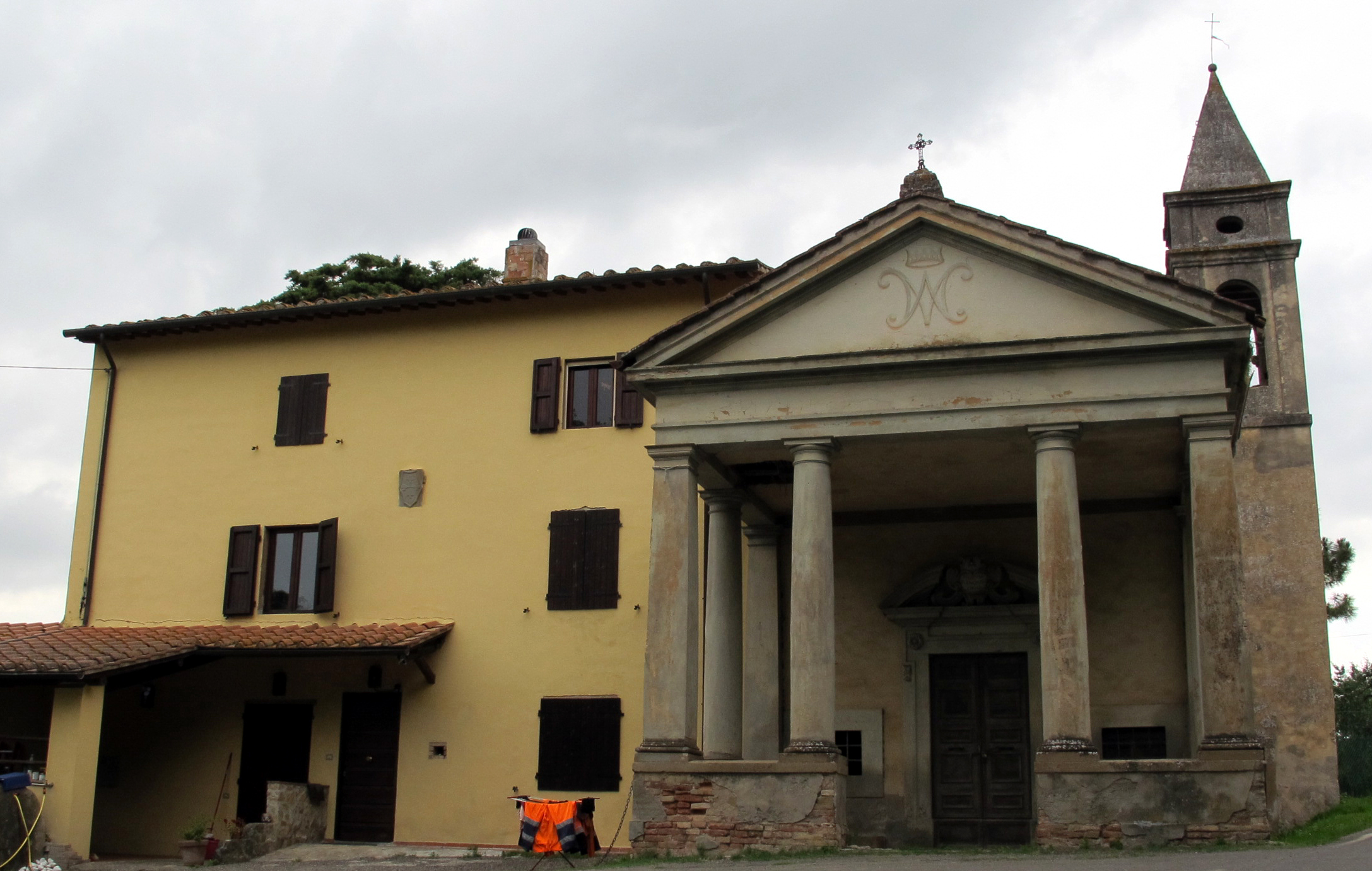 Palaia, chiesa in loc. Montacchita sulla via nuova